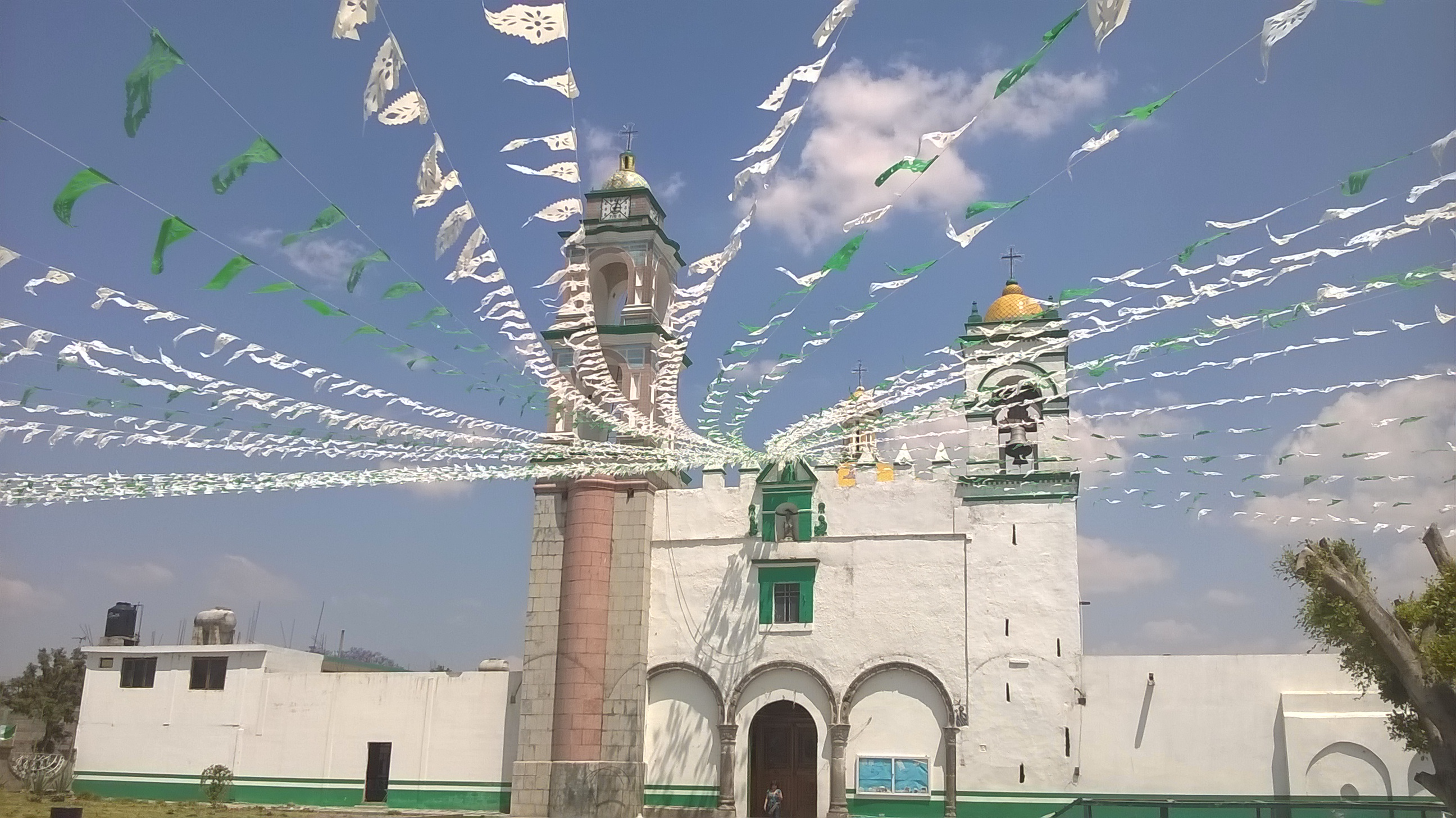 San Juan Huactzinco, Tlaxcala